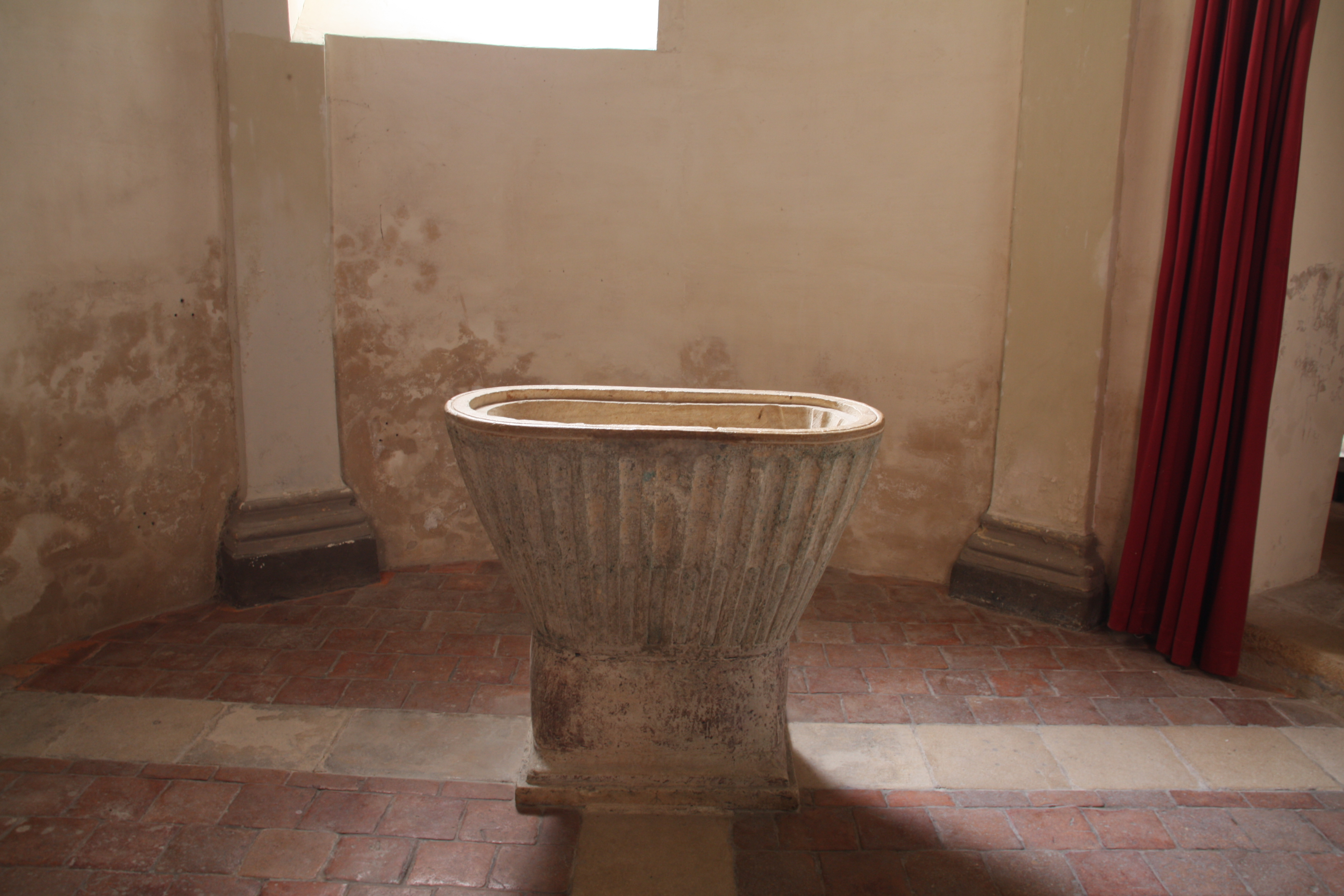 Église Saint-Étienne à Ainay-le-Château, France.